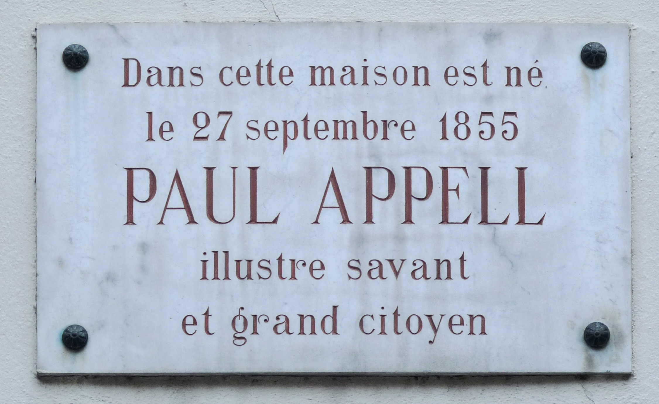 Plaque commémorative sur la maison natale de Paul Appell (place Saint-Etienne, Strasbourg)